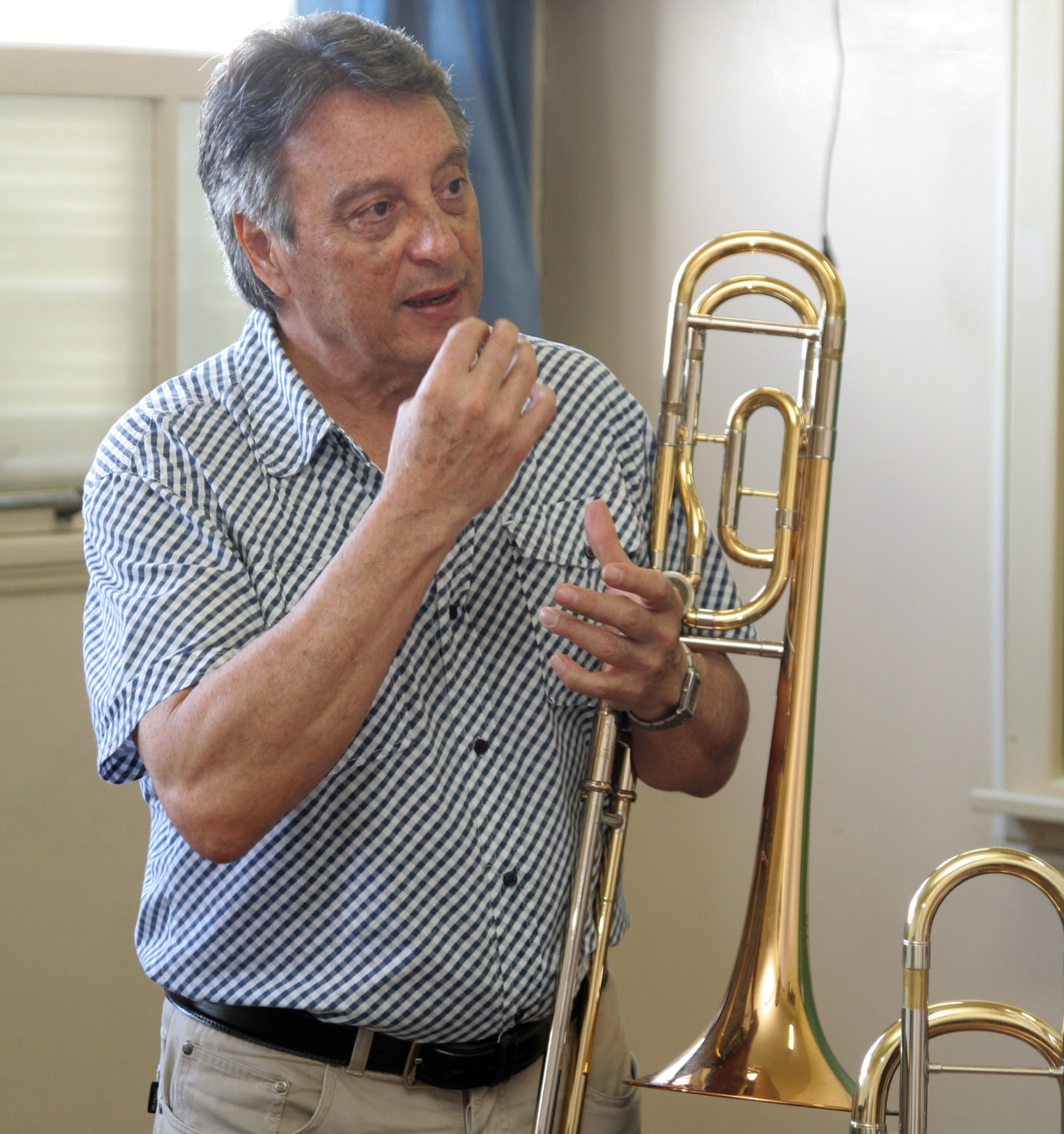 Enrique Crespo 12.01.09 foto Luiz Cequinel 002